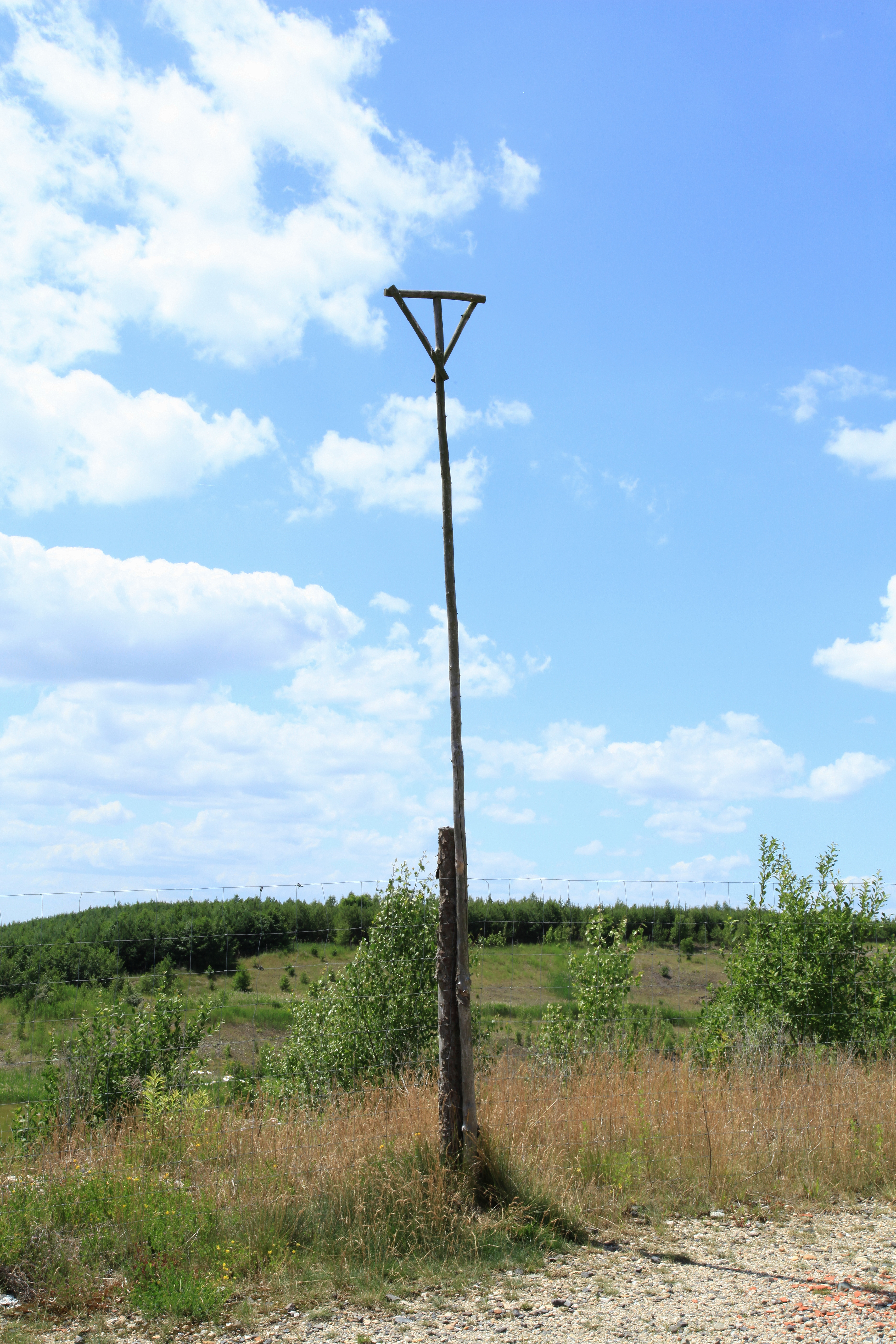 Neuberzdorfer Höhe in Schönau-Berzdorf